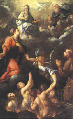 Pala del suffragio, transetto sinistro, Intercession altarpiece